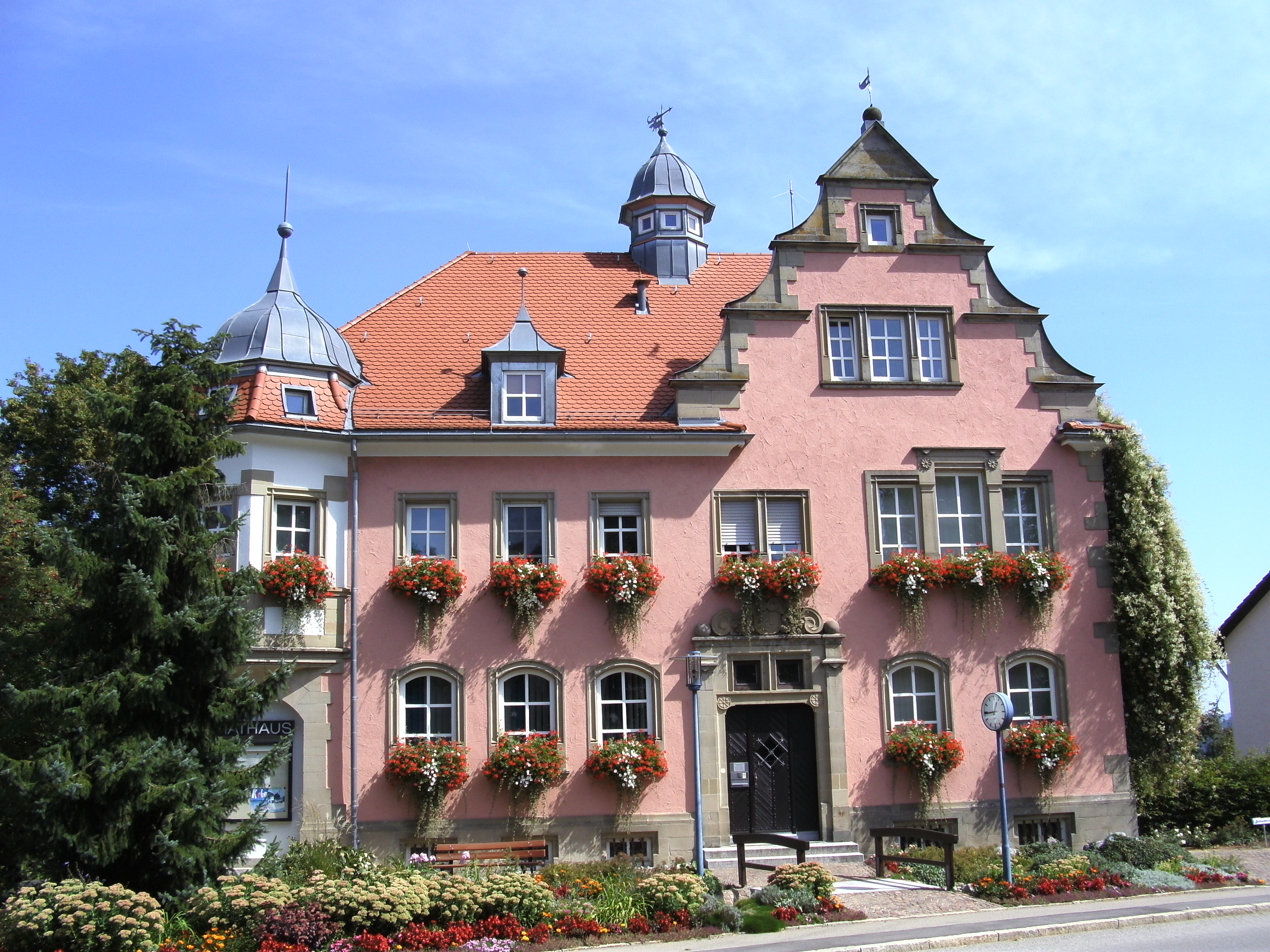 Rathaus von Dauchingen, Deutschland